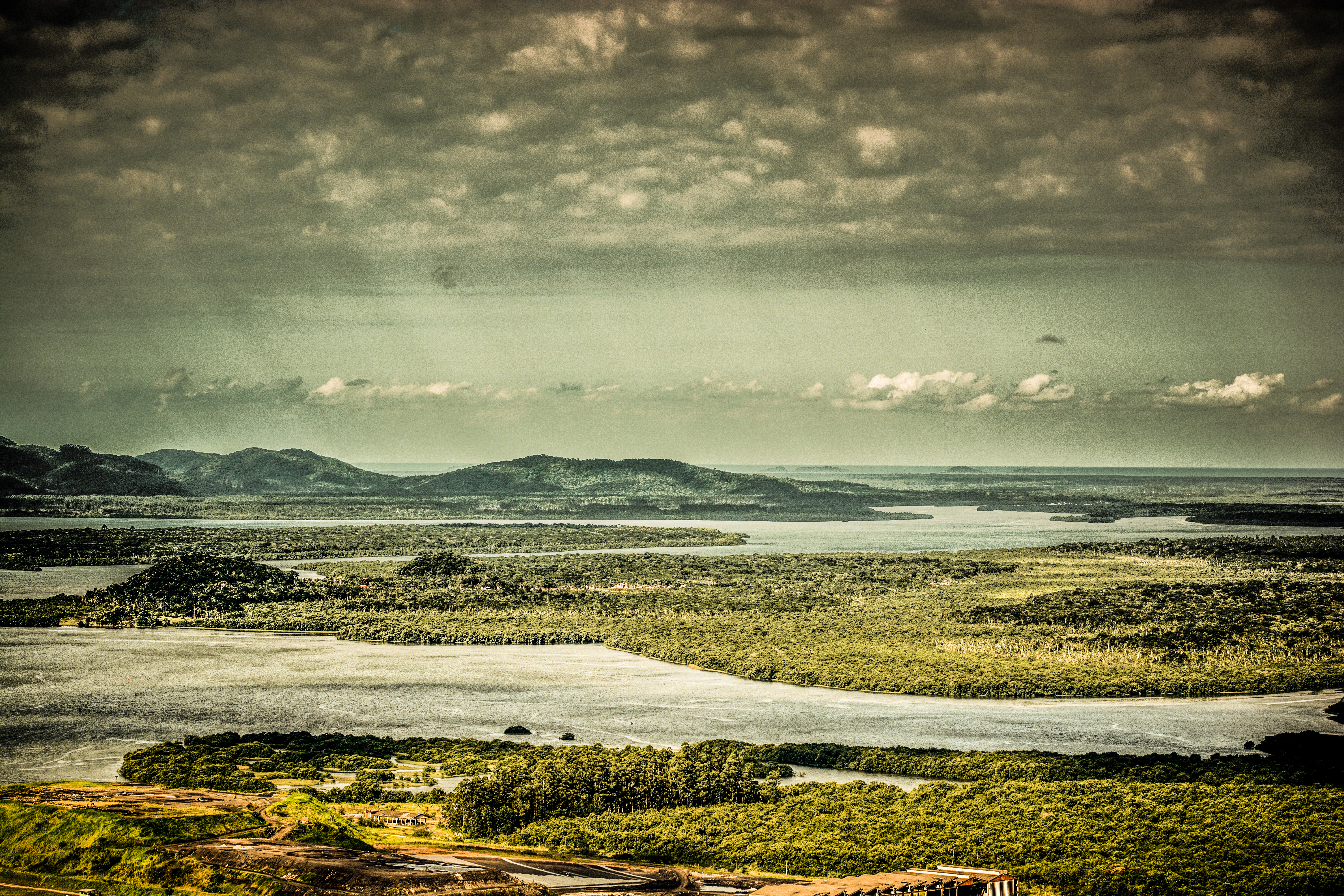 Bela vista da baía da Babitonga do mirante do morro do Boa Vista em Joinville.